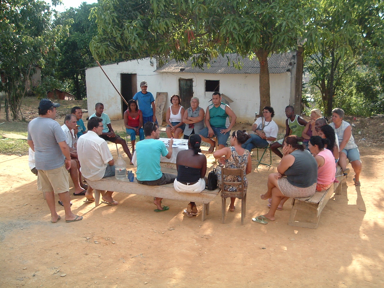 Assembléia Popular em Belford Roxo, Rio de Janeiro, Brasil